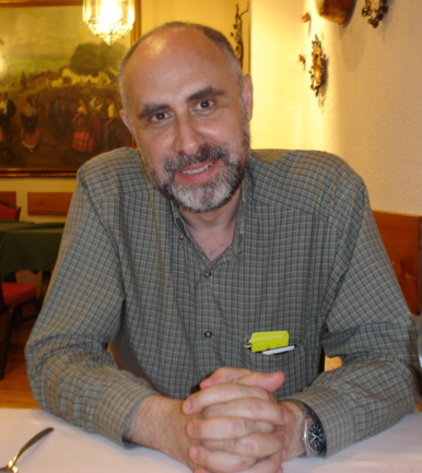 Alberto Elena en mayo de 2008